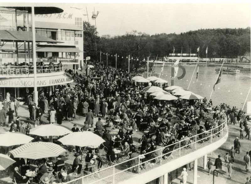 Stockholmsutställningen 1930